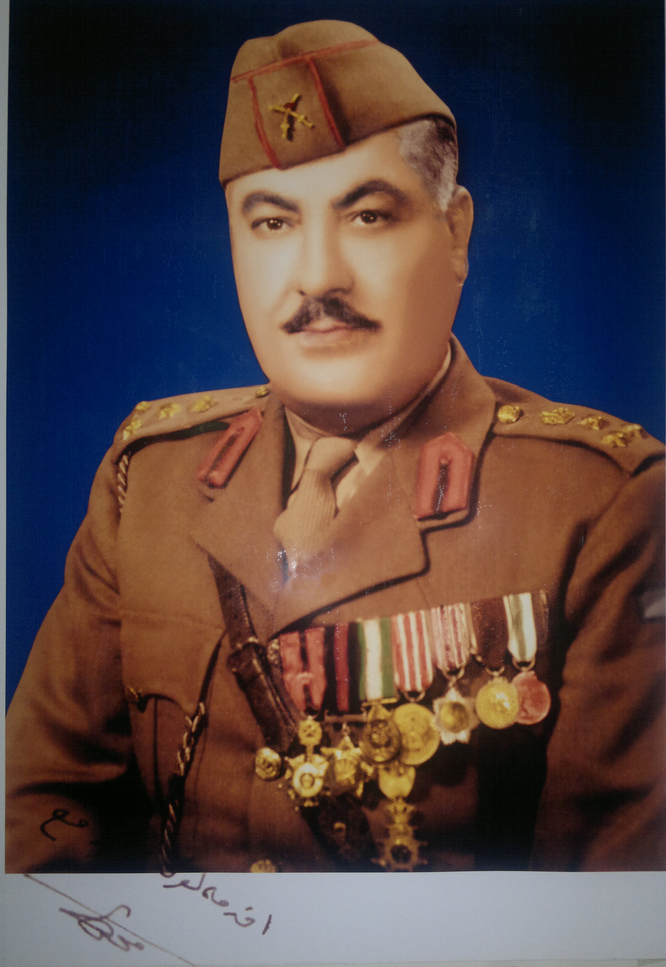 الزعيم طاهر عبدالغفور